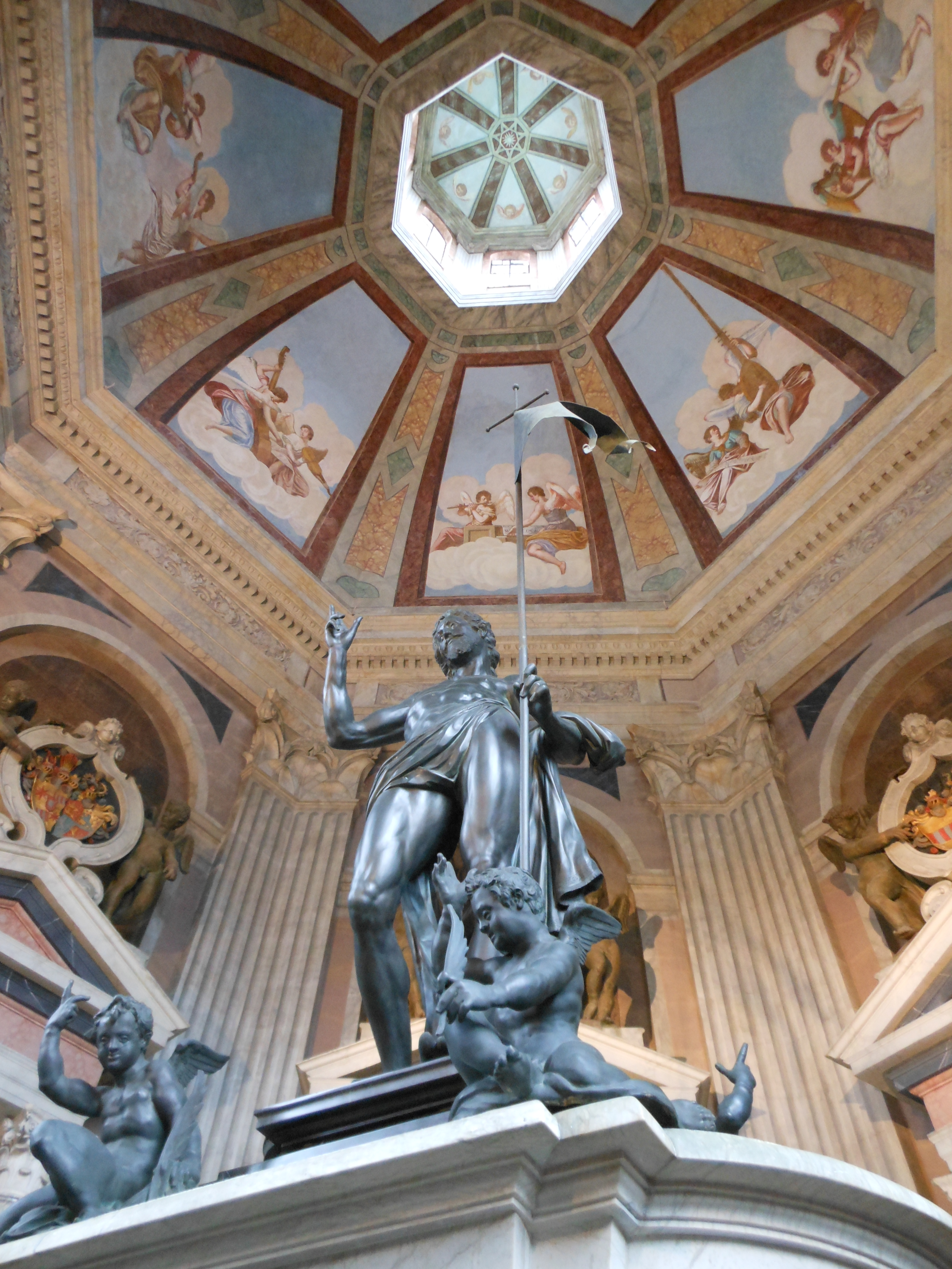 Stadthagen, Fürstenmausoleum, Adrian de Vries: Auferstehung